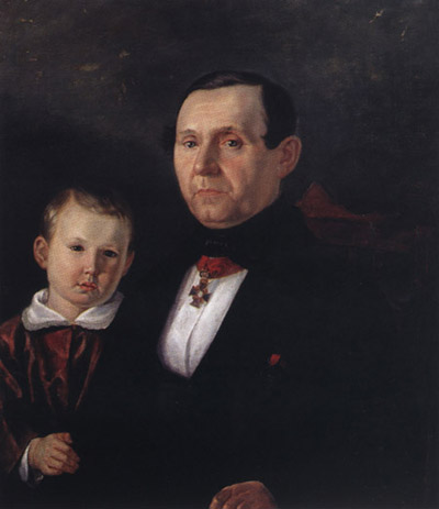 Михаил Иванович Песков (1834-1864) «Портрет П.П. Сукачёва с сыном Владимиром»